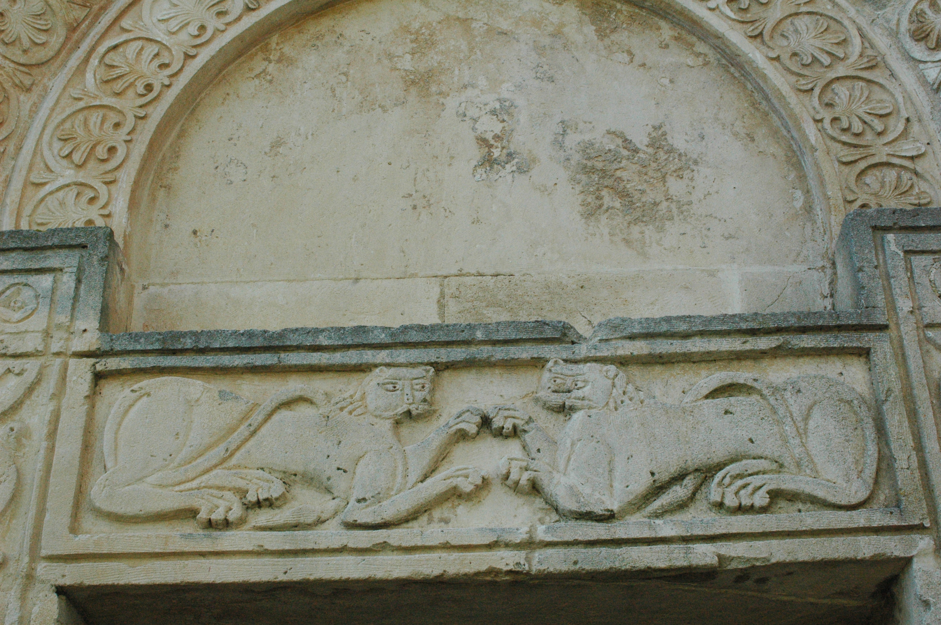 Architrave, Abbazia di san Liberatore a Maiella (PE)